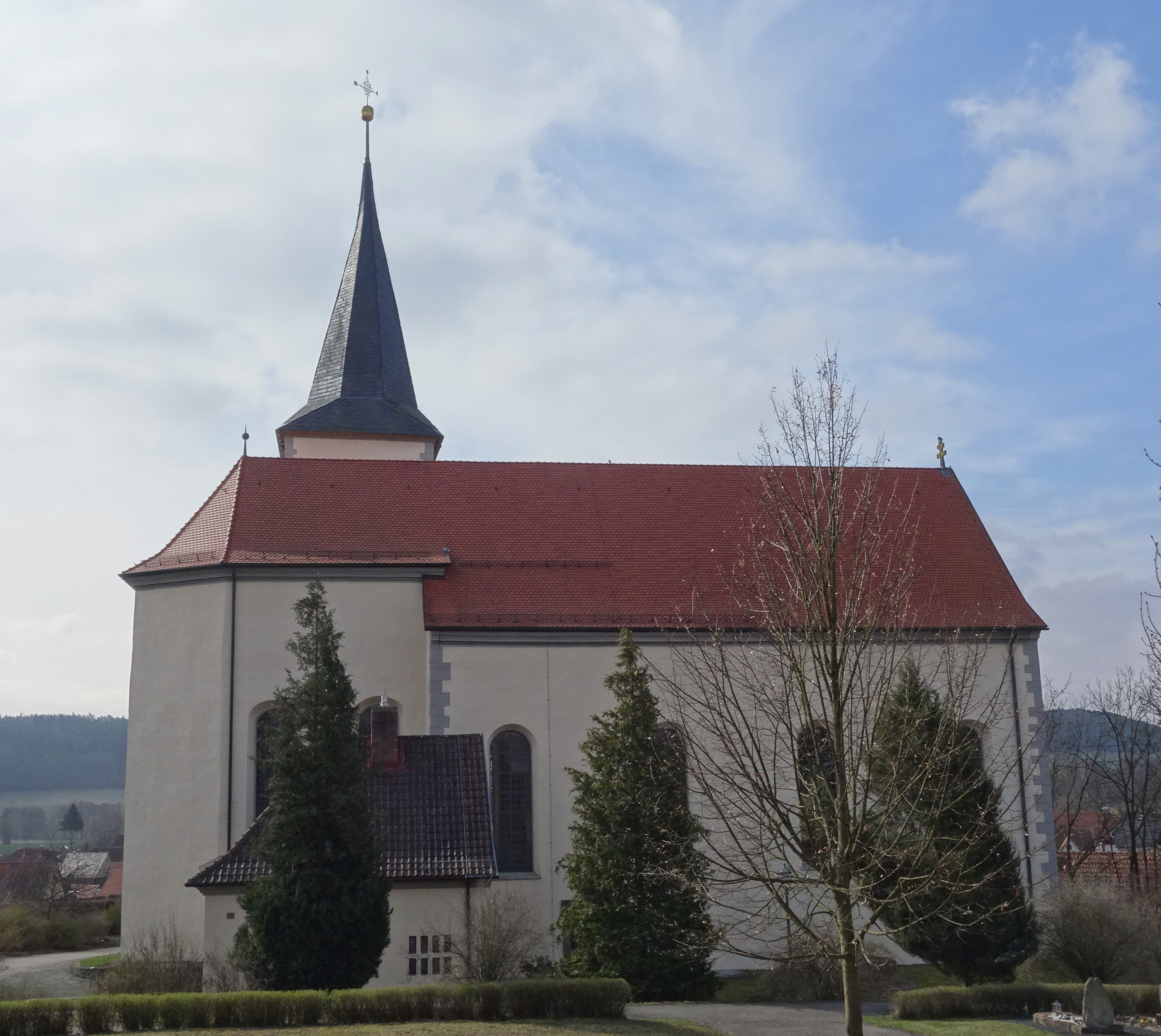 Pfarrkirche St. Johannes der Täufer, Nordheim vor der Rhön